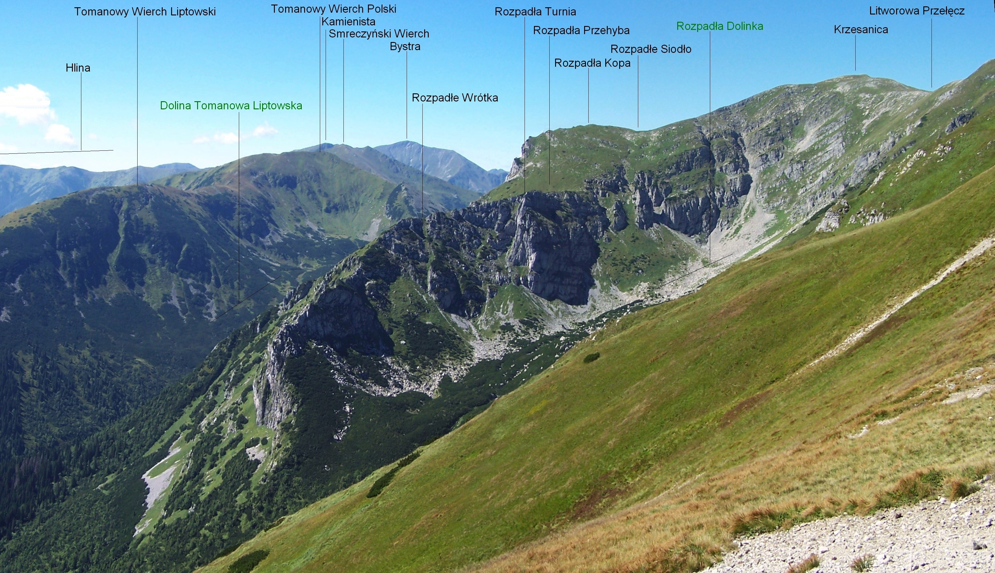 Widok z okolic Suchego Wierchu Kondratowego